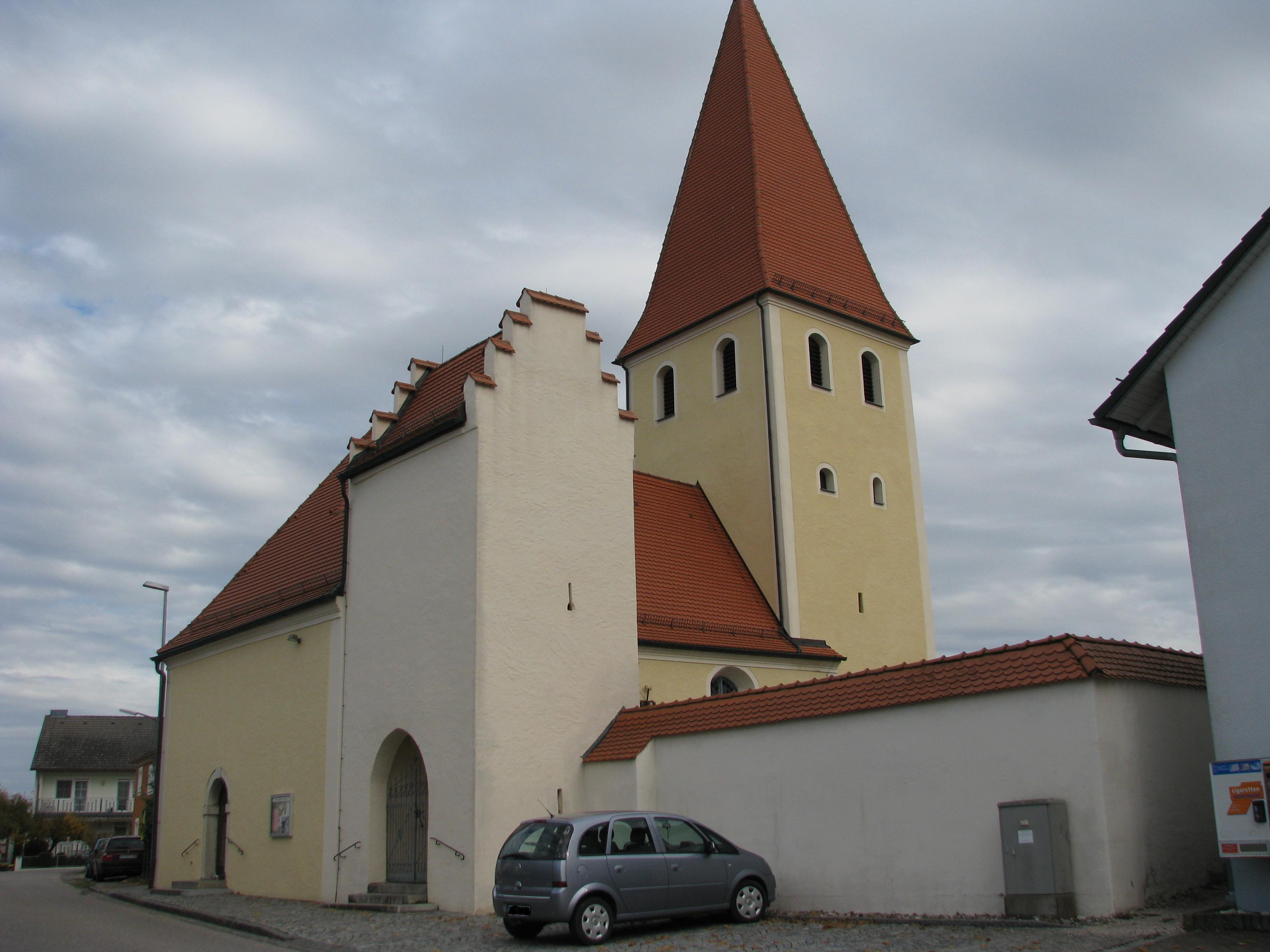 Landerzhofen, Ortsteil von Greding im Landkreis Roth in Bayern, Filialkirche St. Thomas mit Friedhofsbefestigung